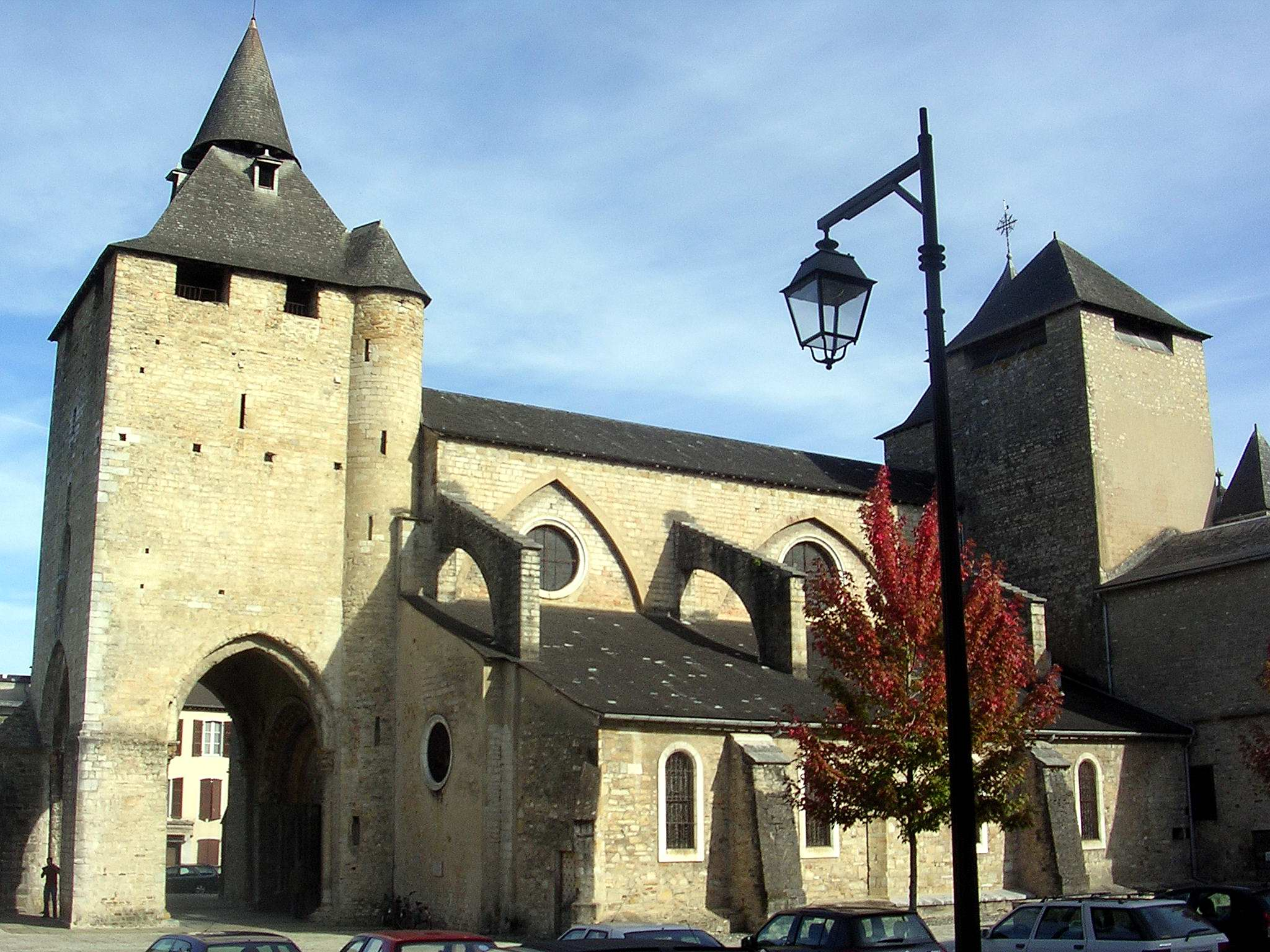 Cathédrale Sainte-Marie d'Oloron, dans le département français des Pyrénées-Atlantiques